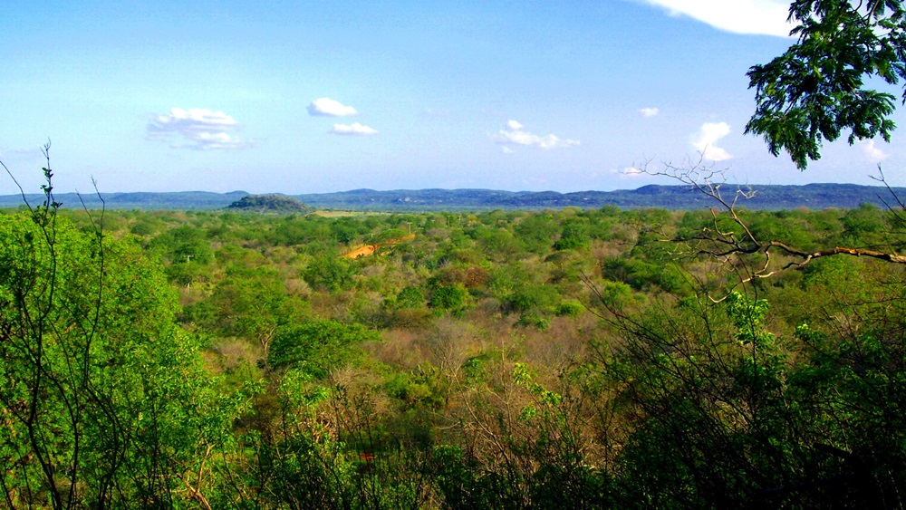 Vegetação de caatinga sobre a região do alto vale da bacia do Rio Parnaíba, Serra Dois Irmãos em Dirceu Arcoverde